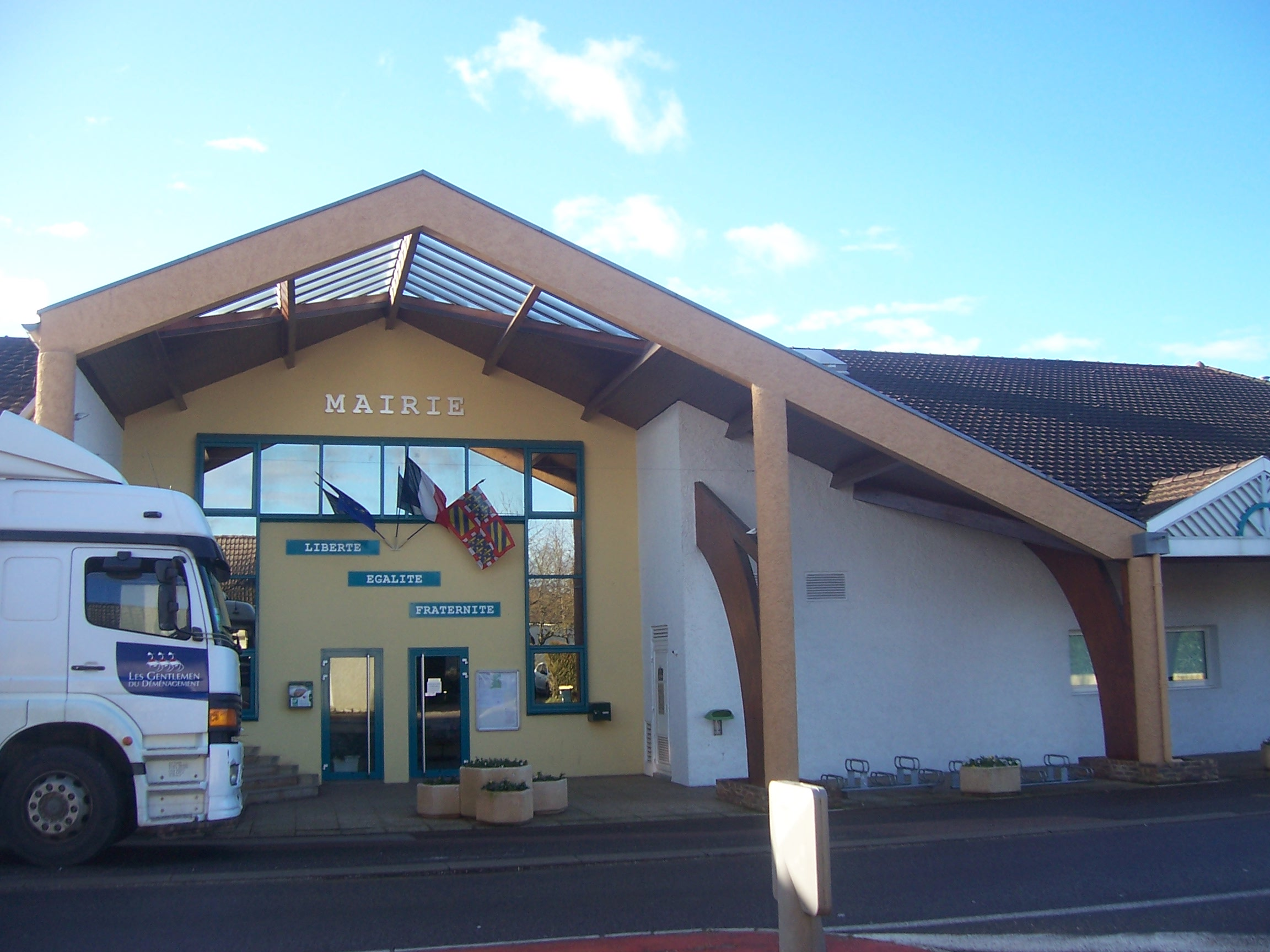 Oslon Mairie